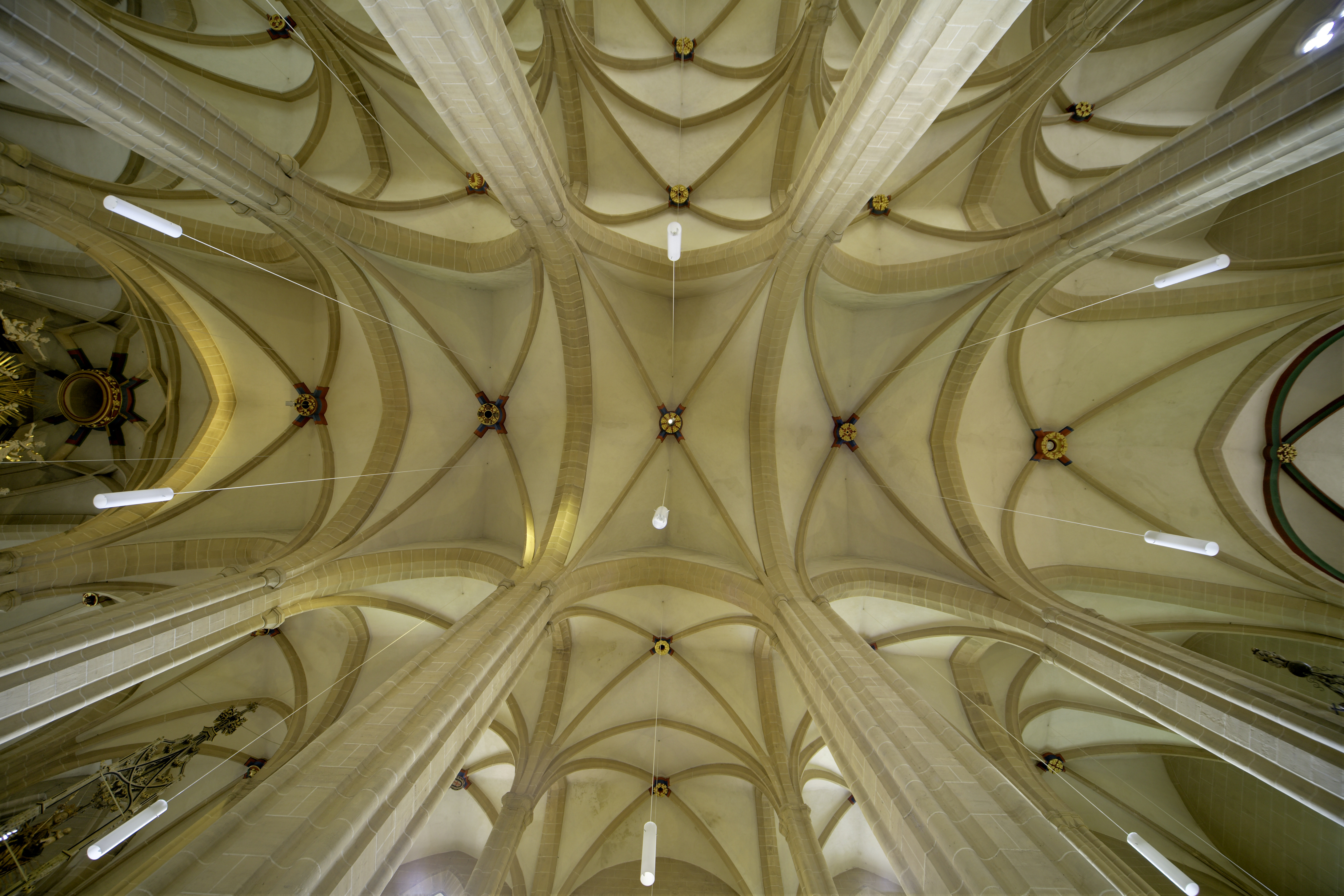 Erfurt Severikirche